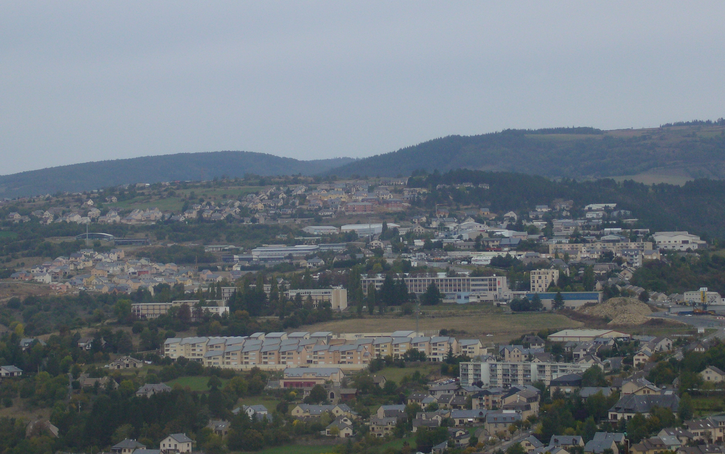 Quartier de Valcroze + Chabannes (Mende, Lozère, France)